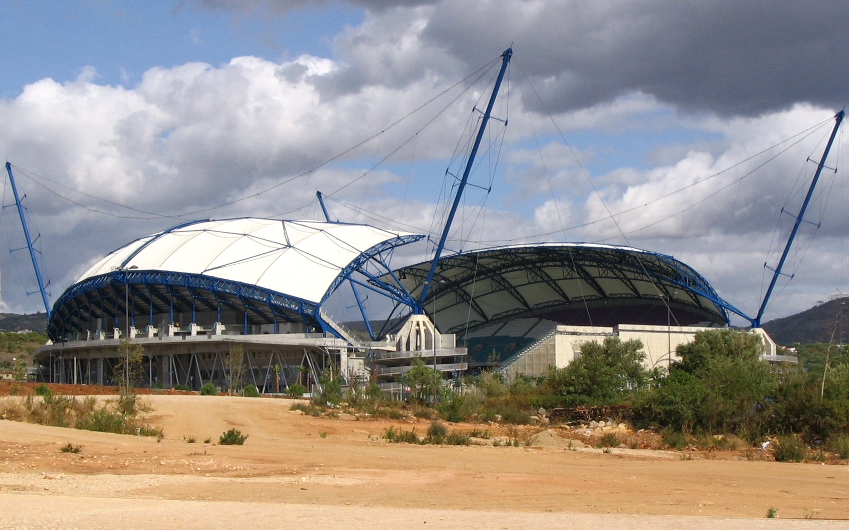 Ungenutztes Algarve-Stadion Autor: Hunter88 (selbst fotografiert)